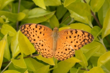 Phalantha phalantha adult